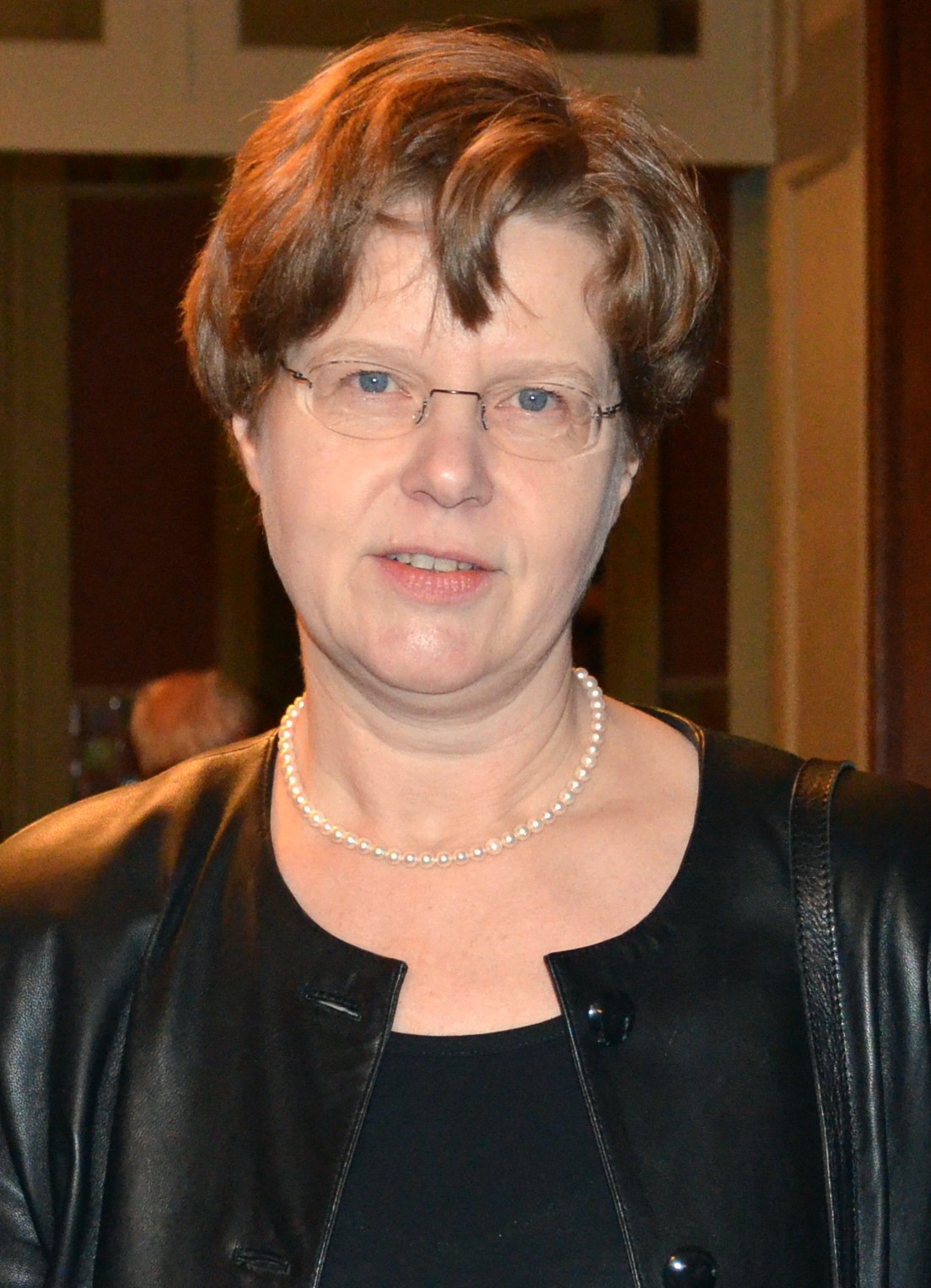 Stelldichein zur Eröffnung von Bet Tfilas Wanderausstellung Synagoge und Tempel in der Villa Seligmann in Hannover (von links): Helwig Schmidt-Glintzer (Direktor der Herzog August Bibliothek in Wolfenbüttel), Susanne Rode-Breymann (Präsidentin der Hochschule für Musik, Theater und Medien Hannover) und der Musiker Andor Izsák (u.a. Ehrenpräsident der Siegmund-Seligmann-Stiftung) ...